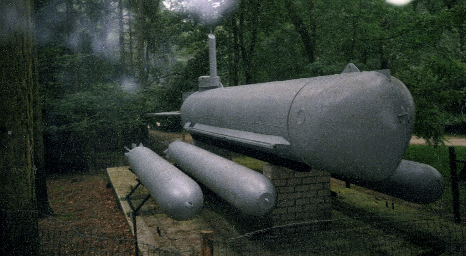 Einmann-U-Boot "Molch" im Oorlogs- en Verzetsmuseum Overloon